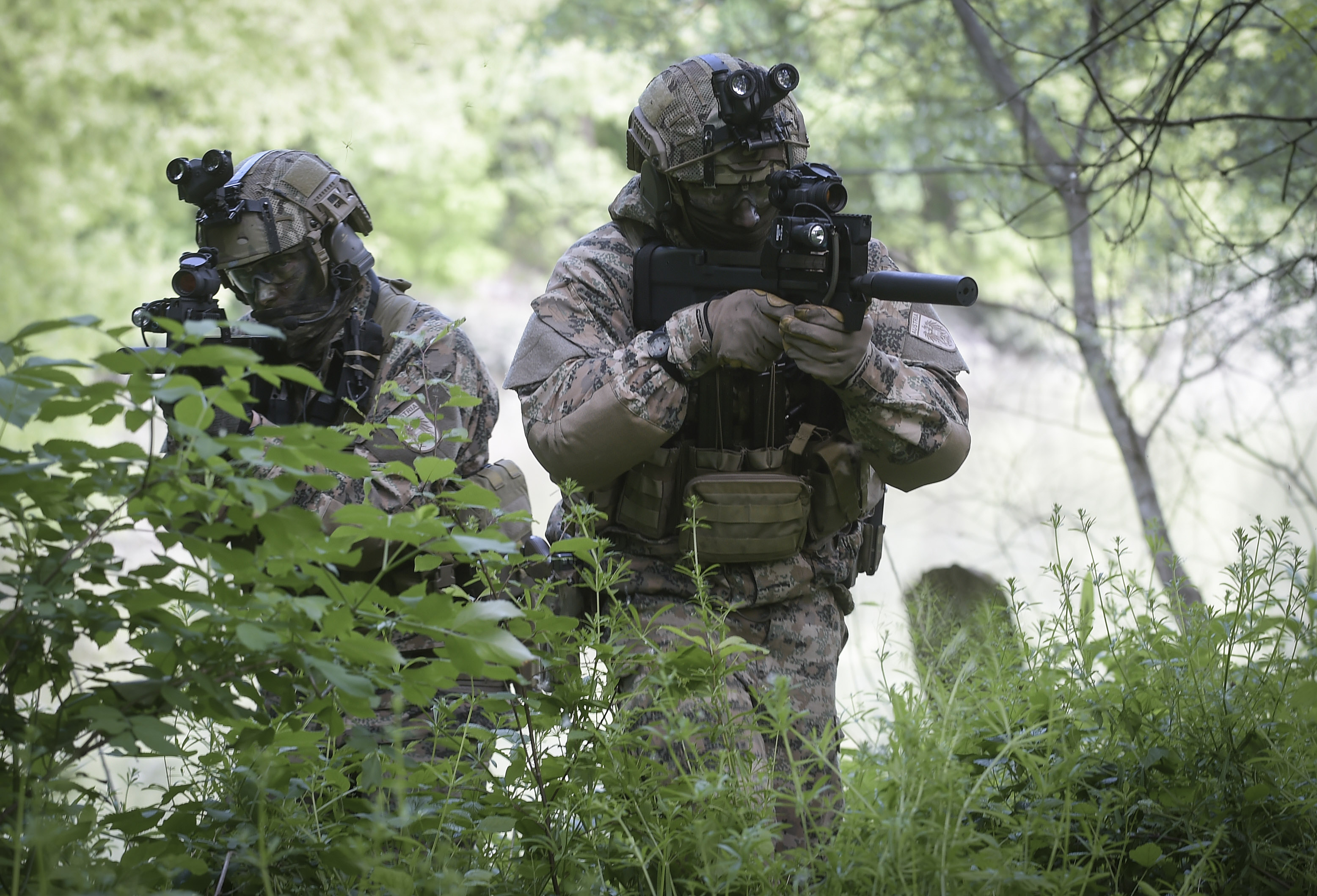 Soldaten der Spezialeinsatzkräfte beim Training.